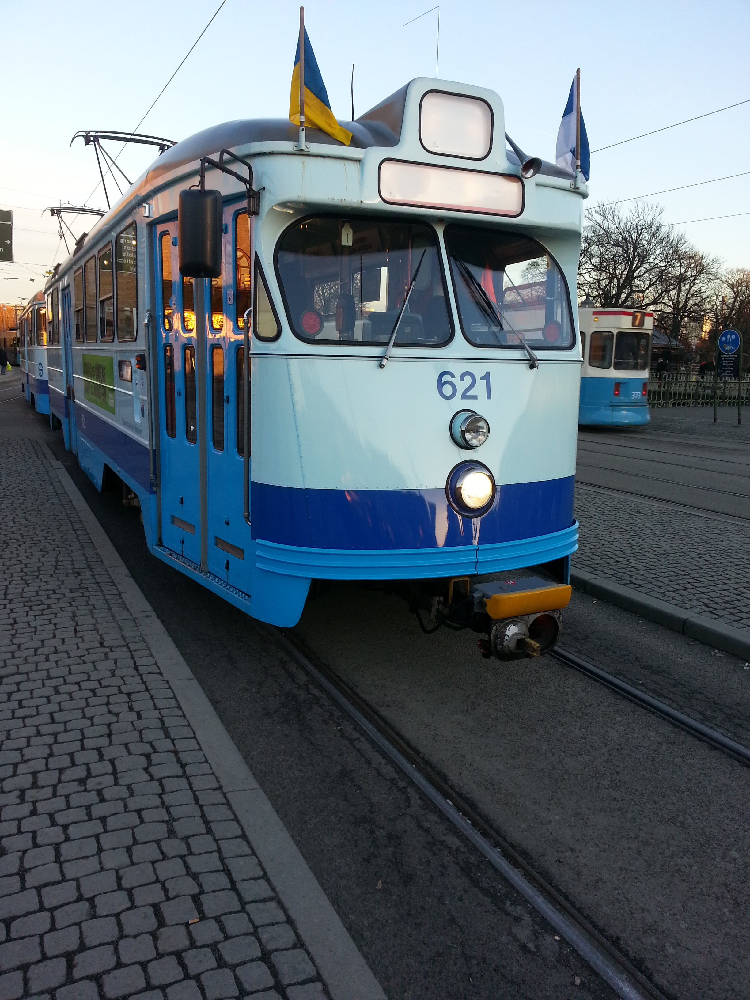 M25-spårvagn nummer 621, med M25-vagn nummer 582 på släp på Drottningtorget 1 mars 2013.